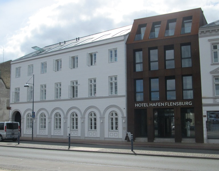 Hotel Hafen Flensburg i Flensborg